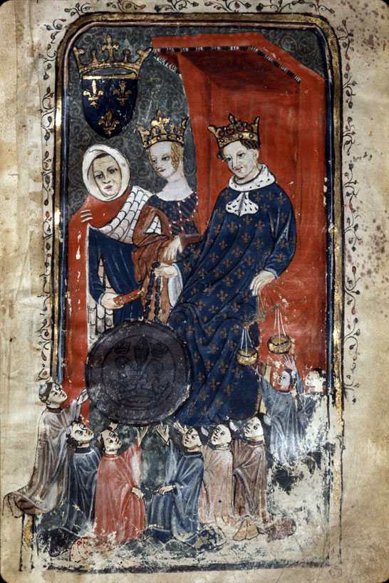 Filip Vi. s první ženou Janou Burgundskou